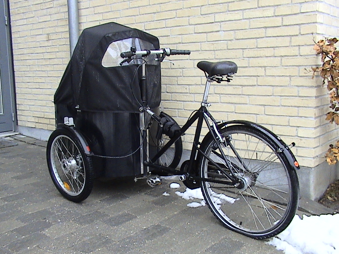 Cargobike designed for transporting children. Ladcykel beregnet til transport af børn (mærke: Nihola) Photo: Ernst Poulsen